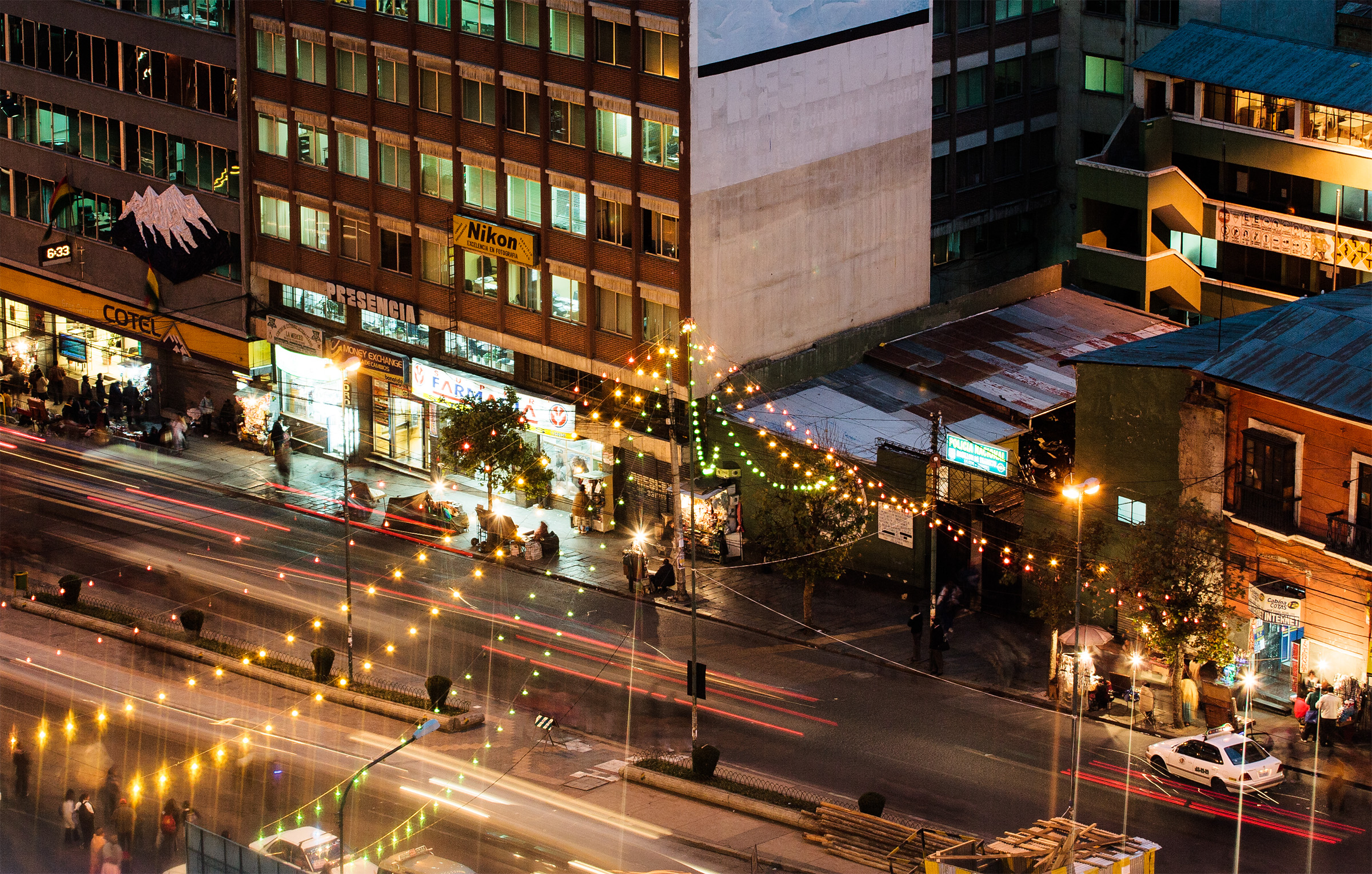 La Paz, Bolivia